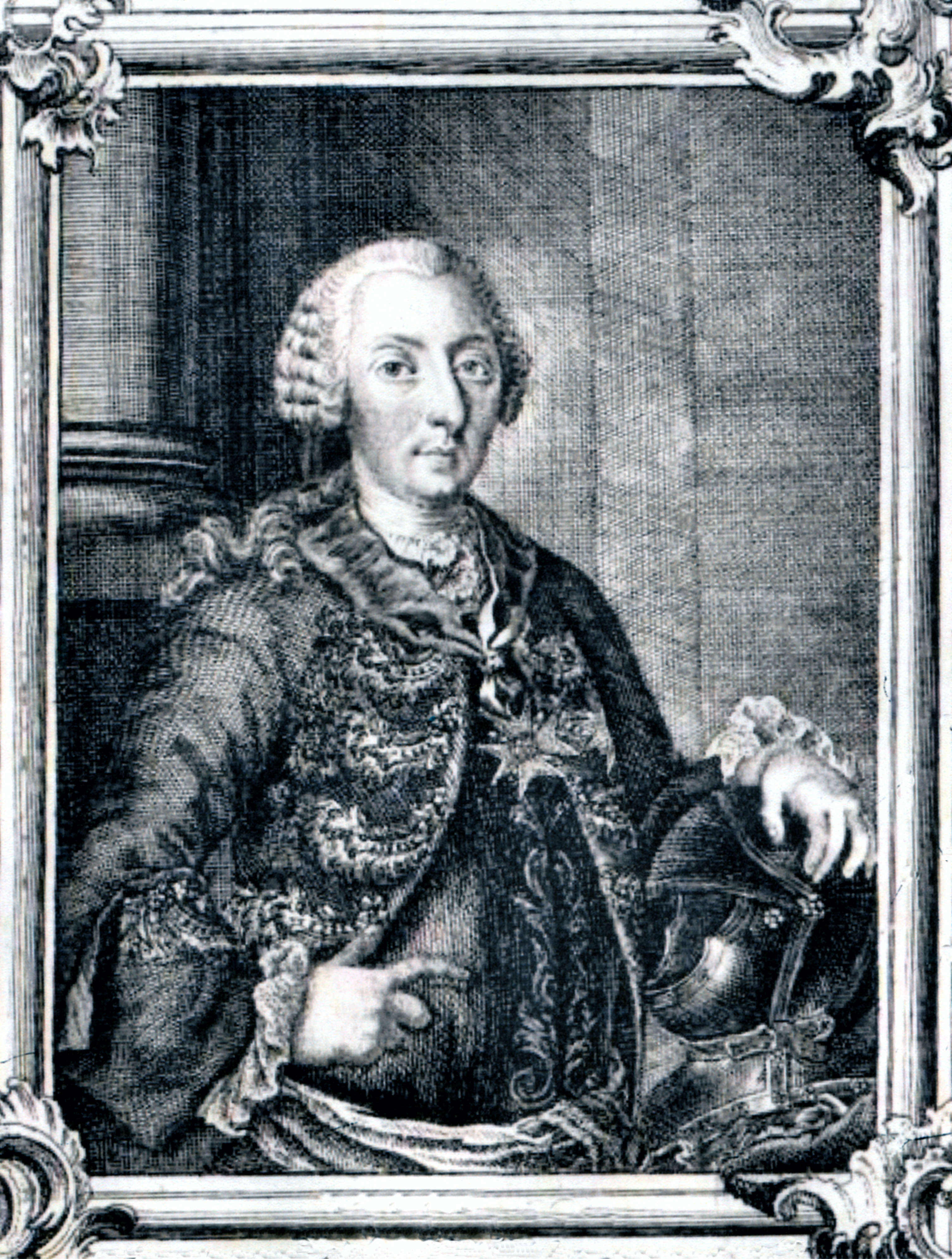 Joseph Clemens Graf von Morawitzky auf Tenczin und Rudnitz nach 1750